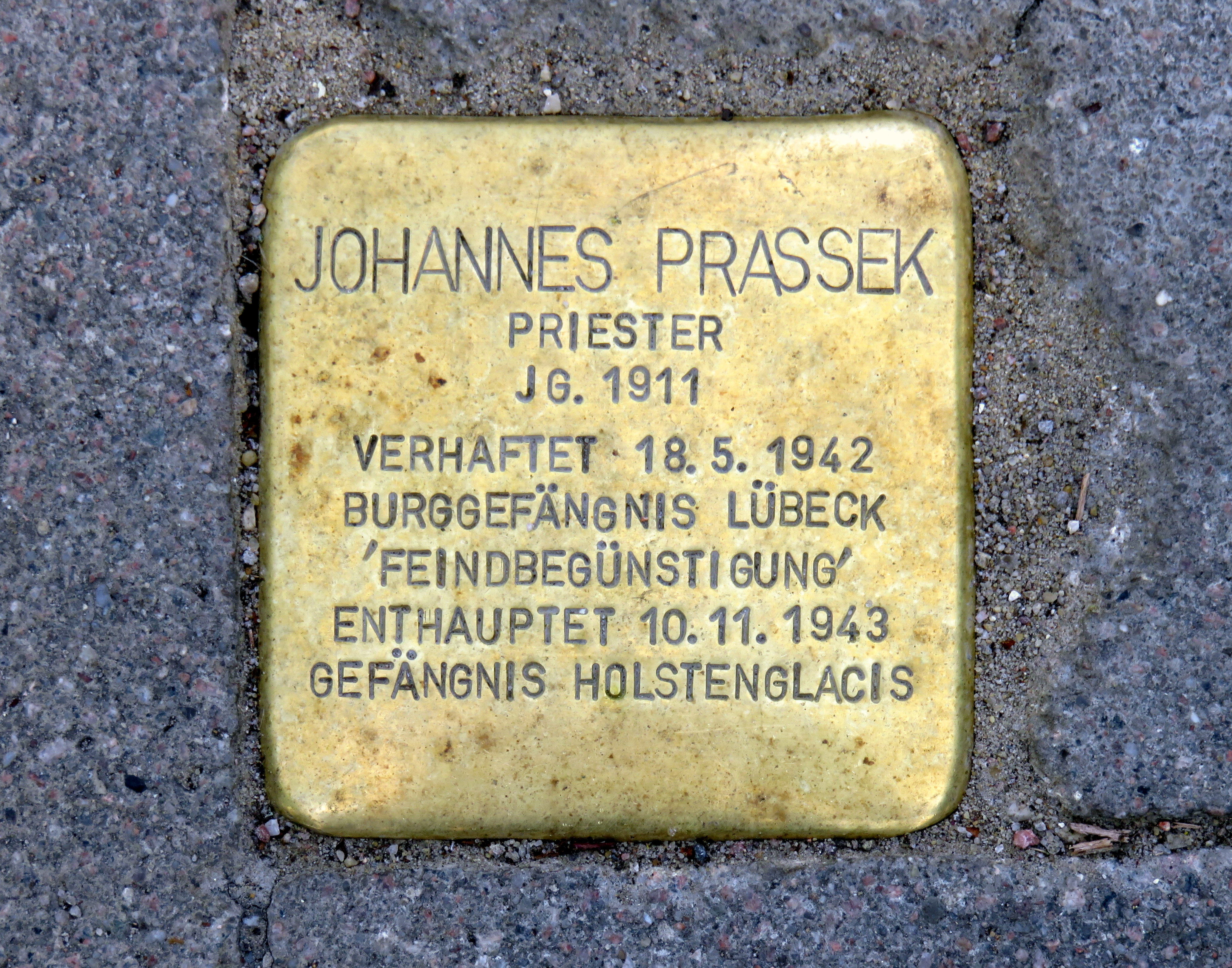 Stolperstein für Johannes Prassek auf dem Gehweg vor der Treppe zur Heilig-Kreuz-Kirche, Farmsener Landstr. 181.